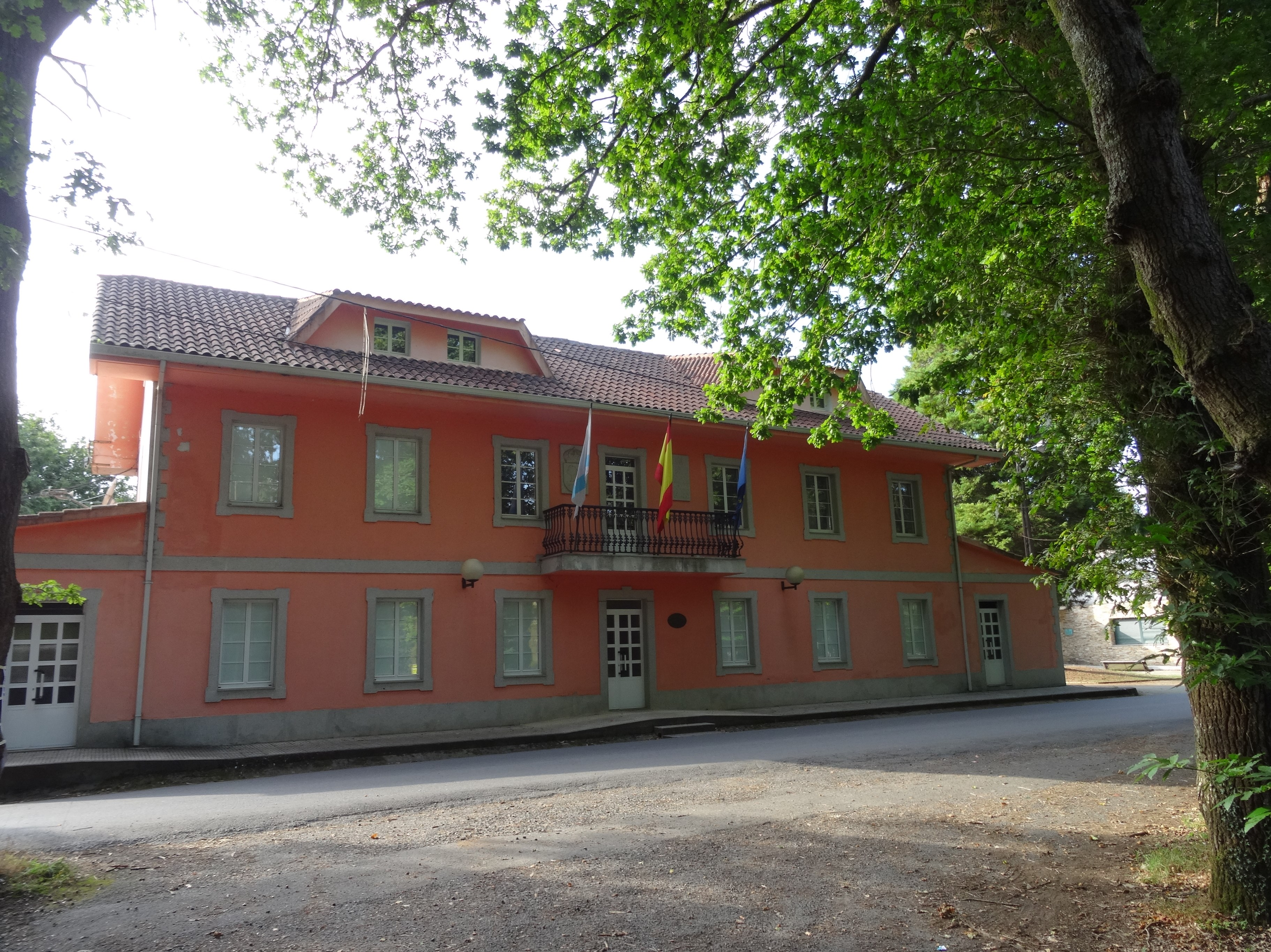 Casa do concello de Frades